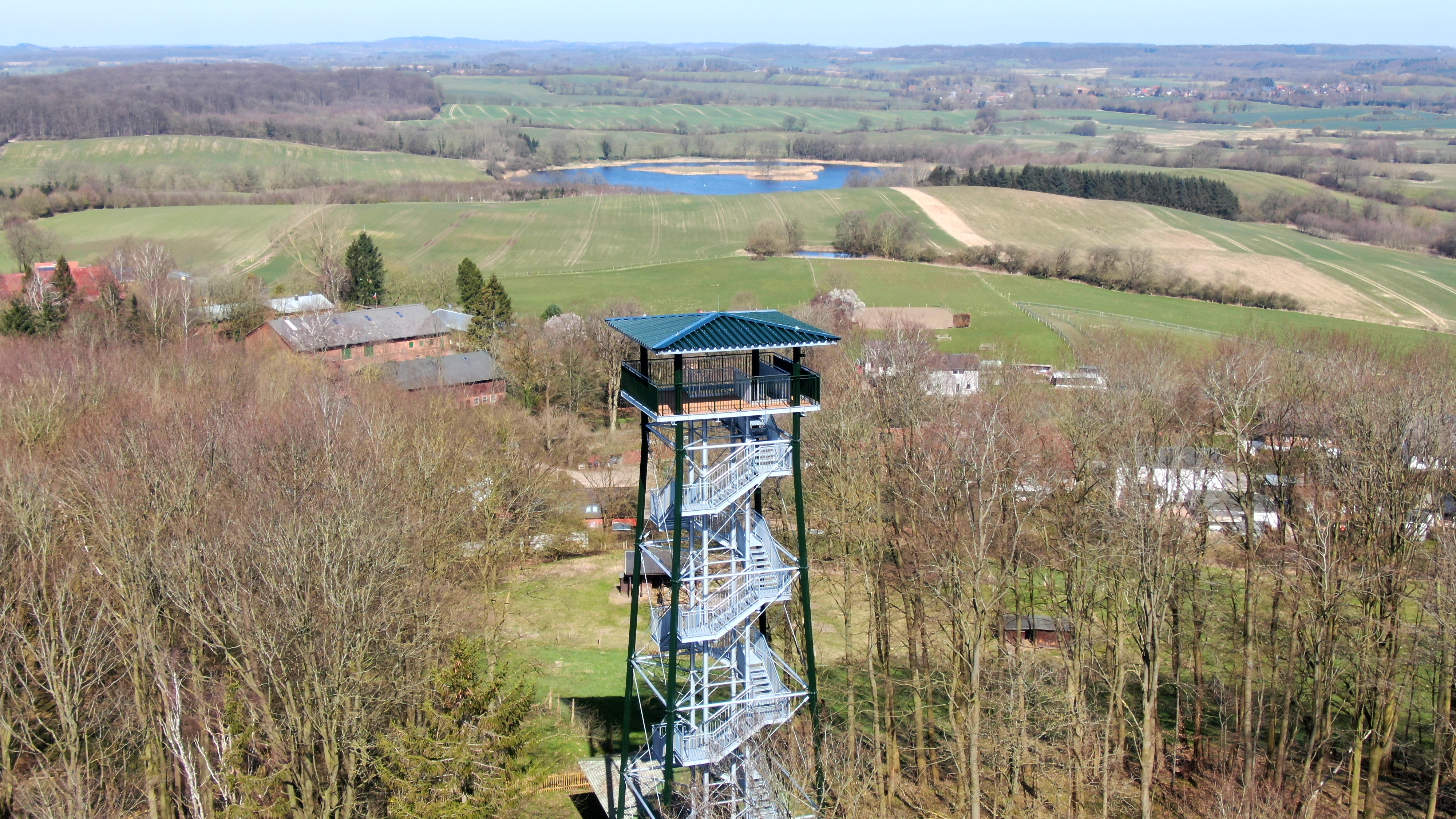 Neuer Holzbergturm bei Malente